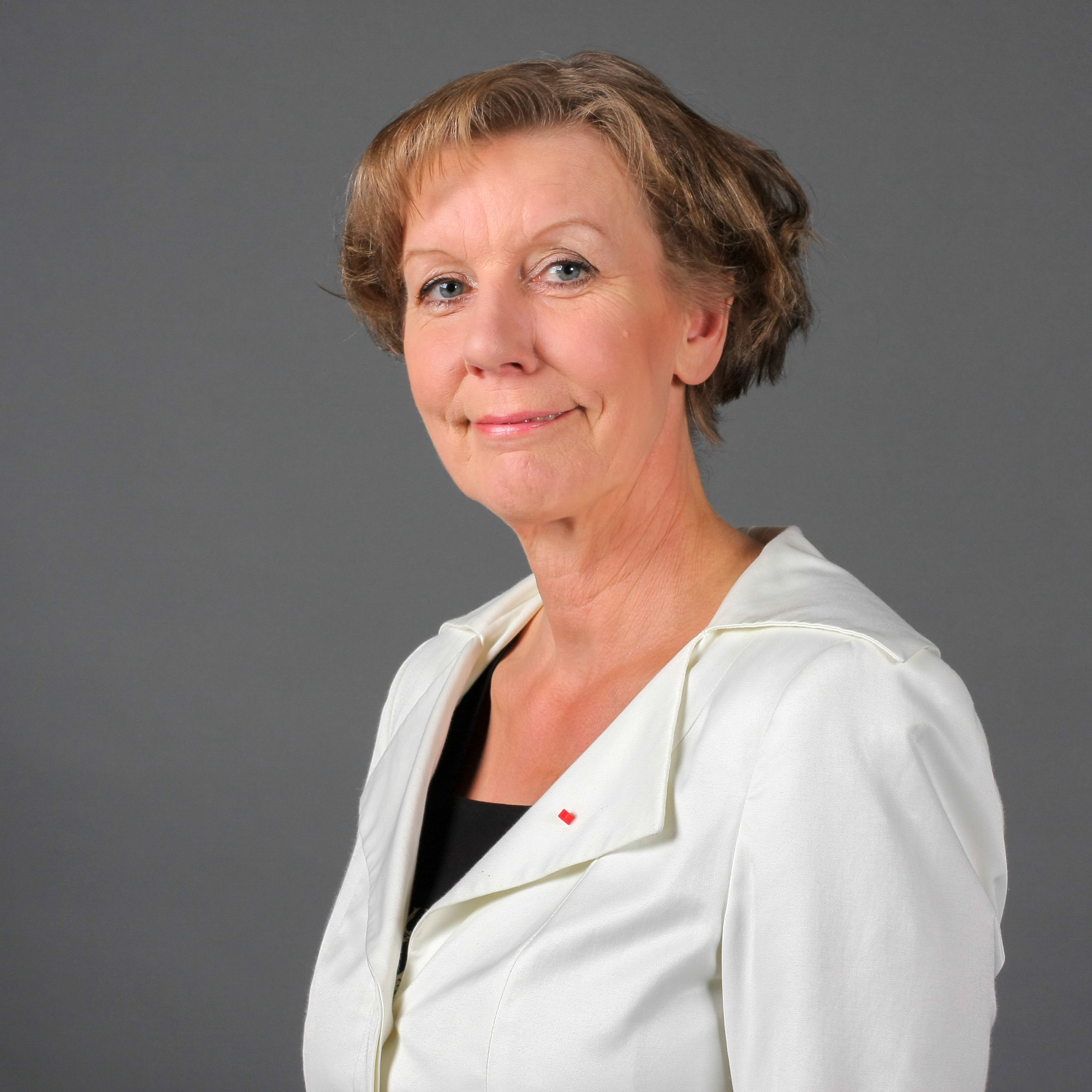 Martina Tegtmeier, MdL Mecklenburg-Vorpommern, SPD Fraktion